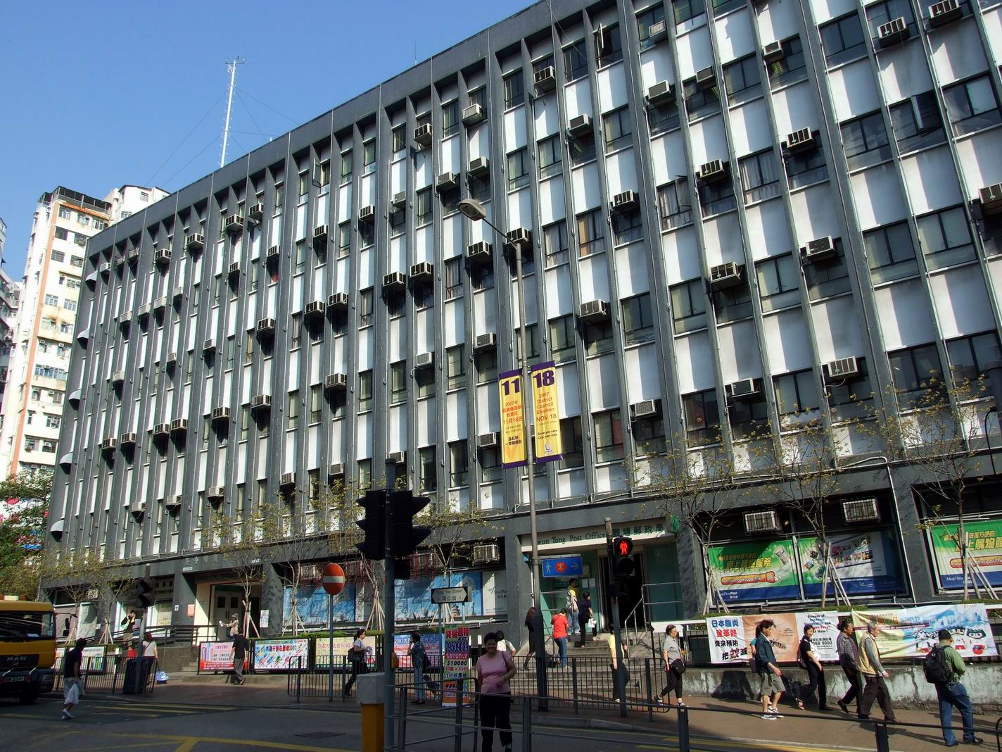 政府合署觀塘分署